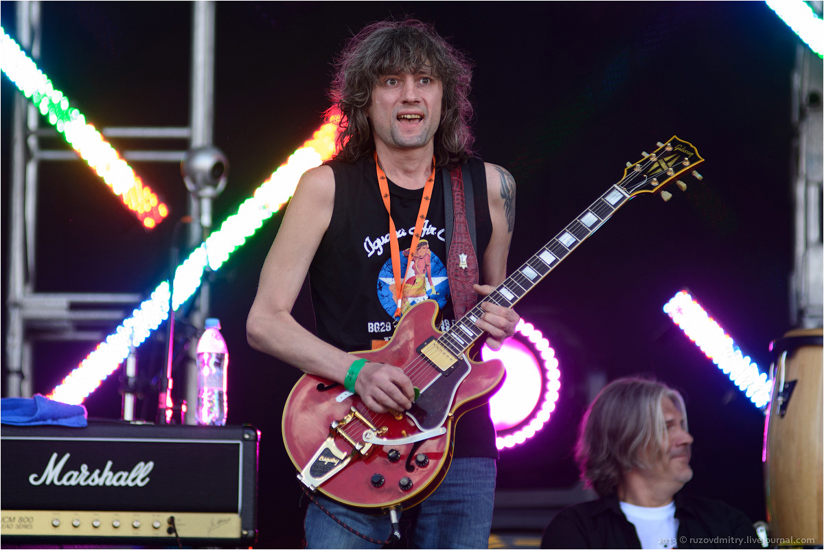 Владимиров Михаил Иванович, группа "Чиж & Co", фестиваль "Рок над Волгой" 2013